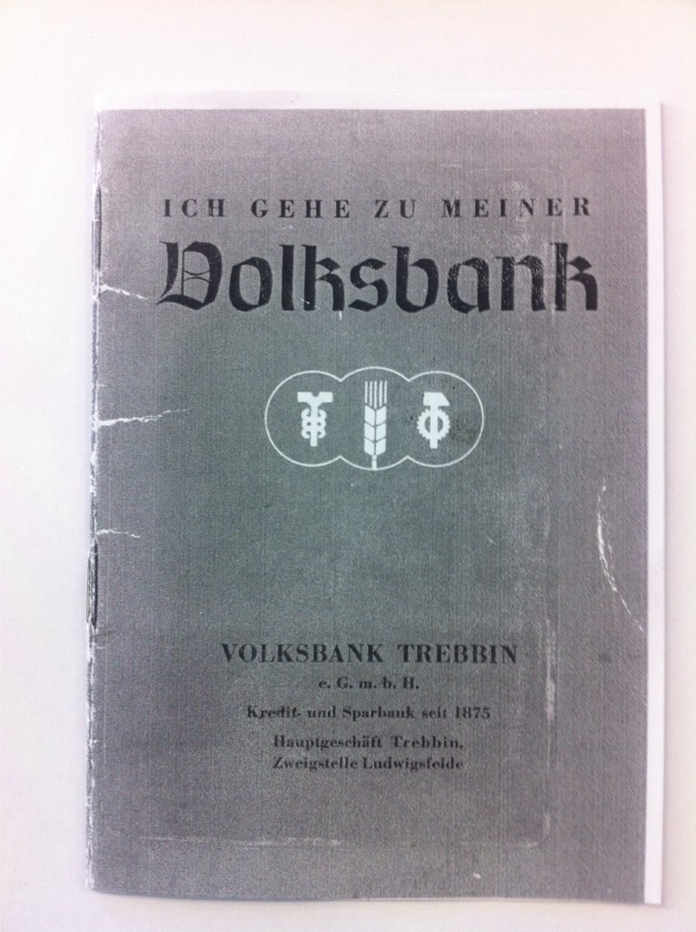 Sparbuch Trebbiner Bank